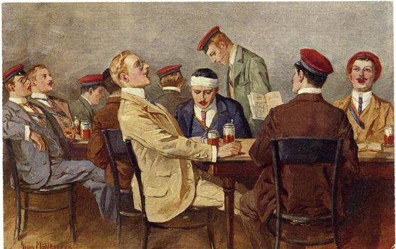 "Cantus" (um 1900), Gemälde von Georg Mühlberg (1863-1925), Rechte abgelaufen. Verbindungsstudenten beim Singen auf einer Kneipe, siehe auch Studentenlied